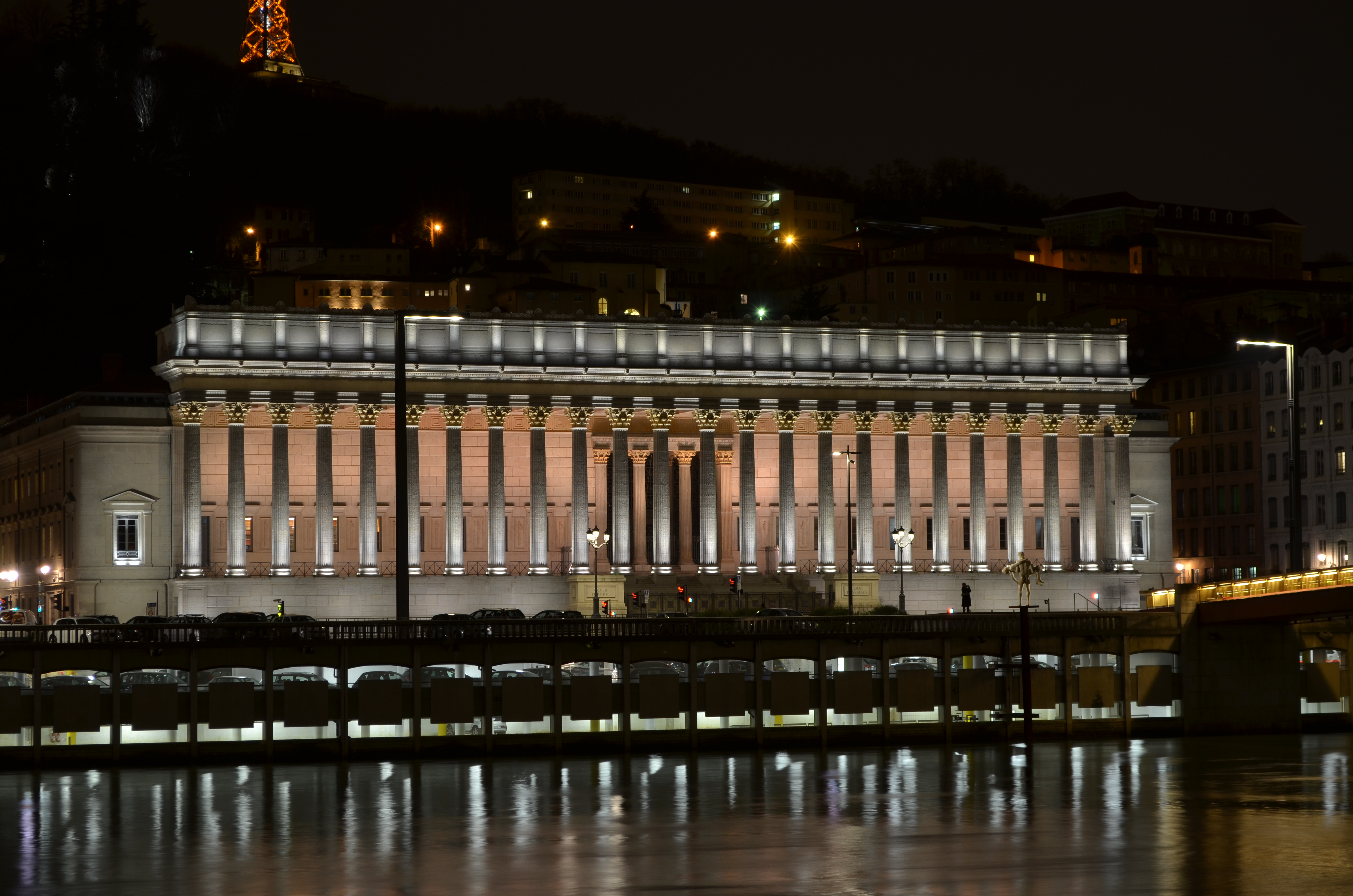 Palais de Justice Histrorique de Lyon de nuit